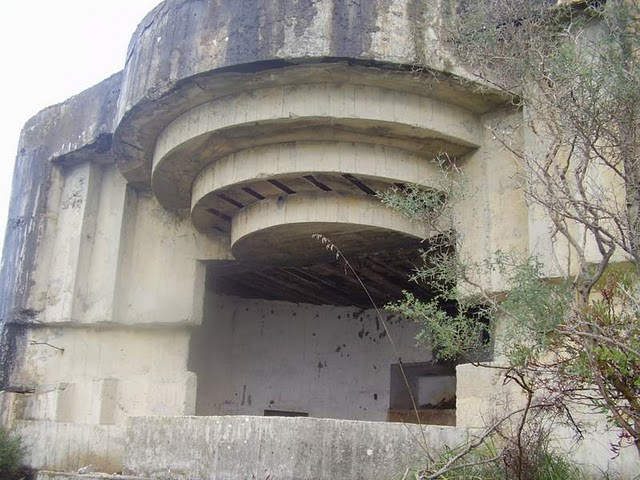 Un bunker della Batteria di Punta Chiappa a est del promontorio. Casamatta da 152/45 di Punta Chiappa.